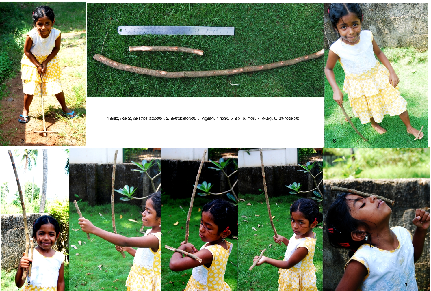 കുട്ടനാട് ഭാഗത്ത് കുട്ടിയും കോലും കളിക്കുന്ന രീതി